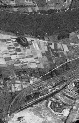 Fort X "Bateria Nadbrzeżna" i Fort XI "Stefan Batory" Twierdzy Toruń sfotografowane przez amerykańskiego satelitę wywiadowczego Corona 98 (KH-4A 1023) w dniu 23 sierpnia 1965 r.